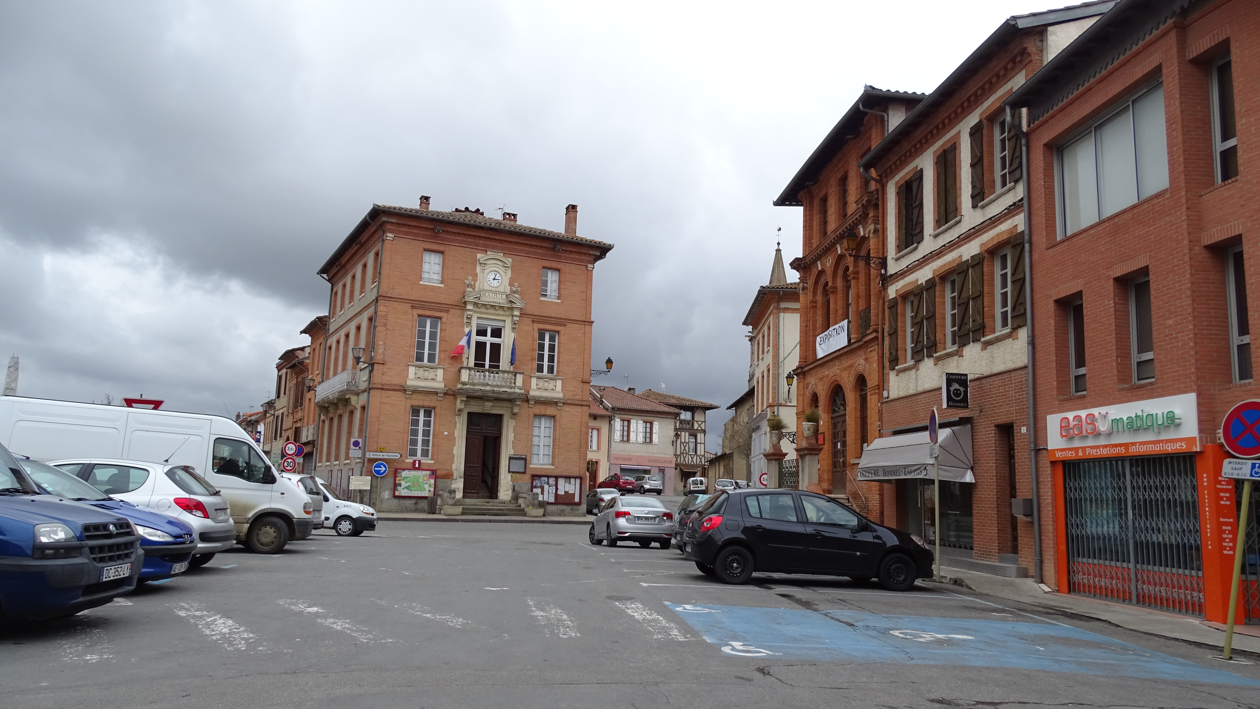 Rieumes